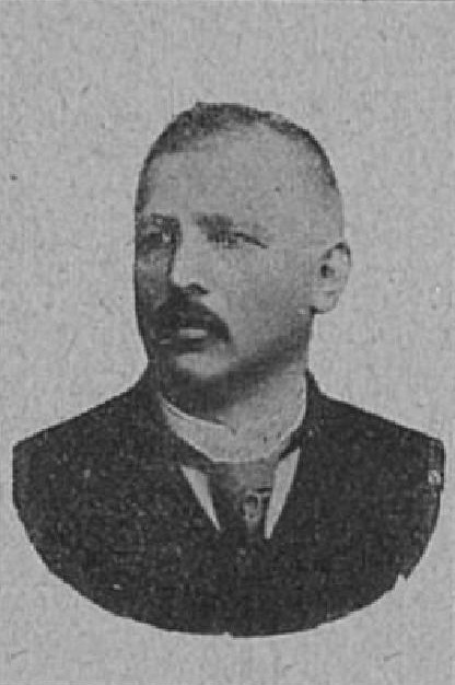 Antonín Hulka (1849-1910), rakouský notář a politik české národnosti z Moravy; poslanec Moravského zemského sněmu